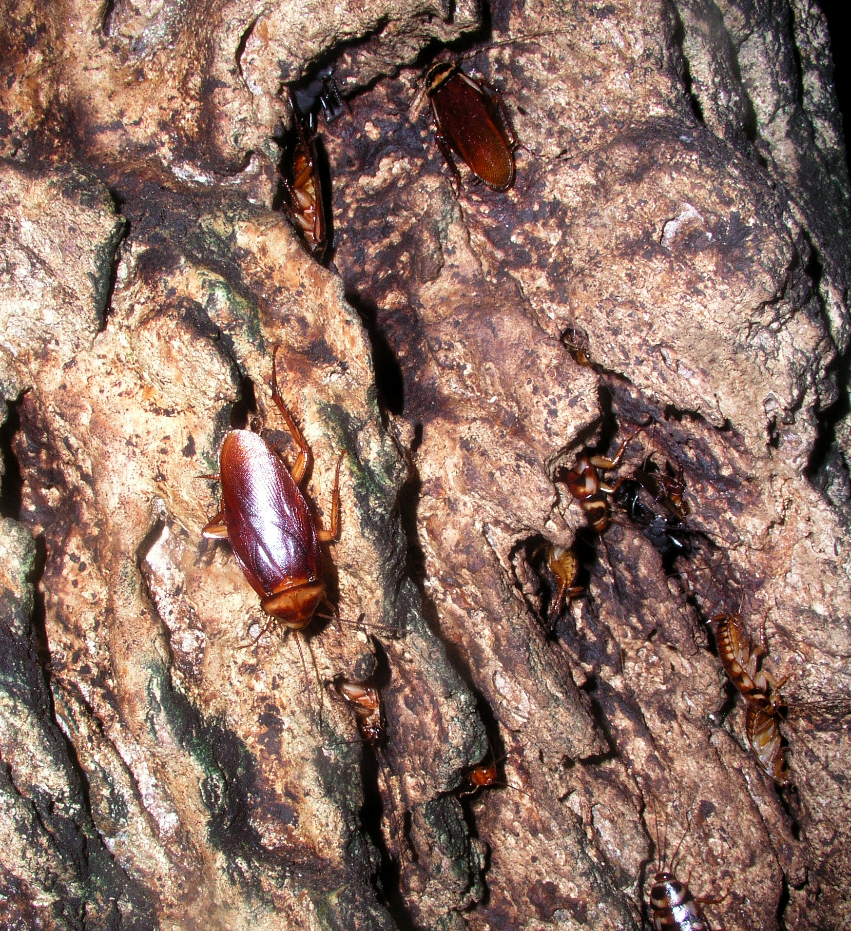 Cucarachas de la cueva de las Lechuzas (Tingo Maria).